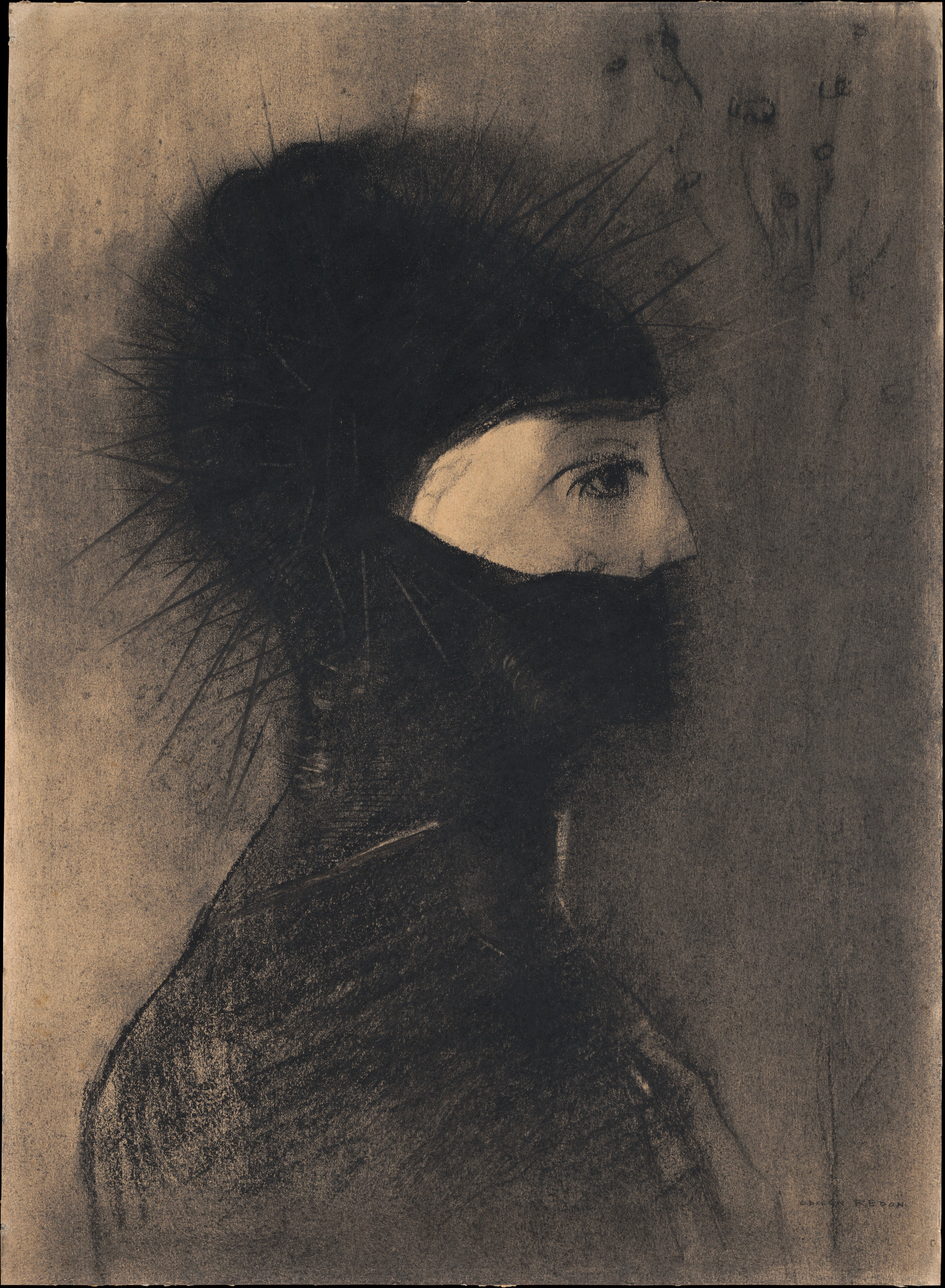 Drawing; Drawings